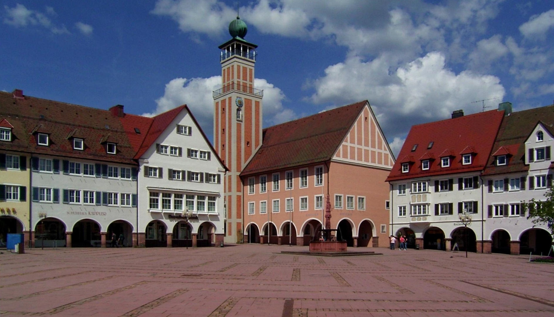 Town Square in Freudenstadt